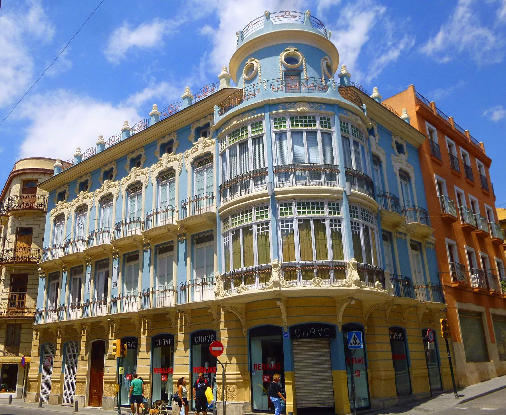 Casa Villaescusa (Severino Ballester, 1920), en Orihuela, provincia de Alicante